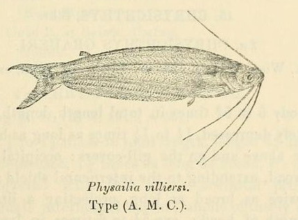 Parailia occidentalis syn. Physailia villiersi